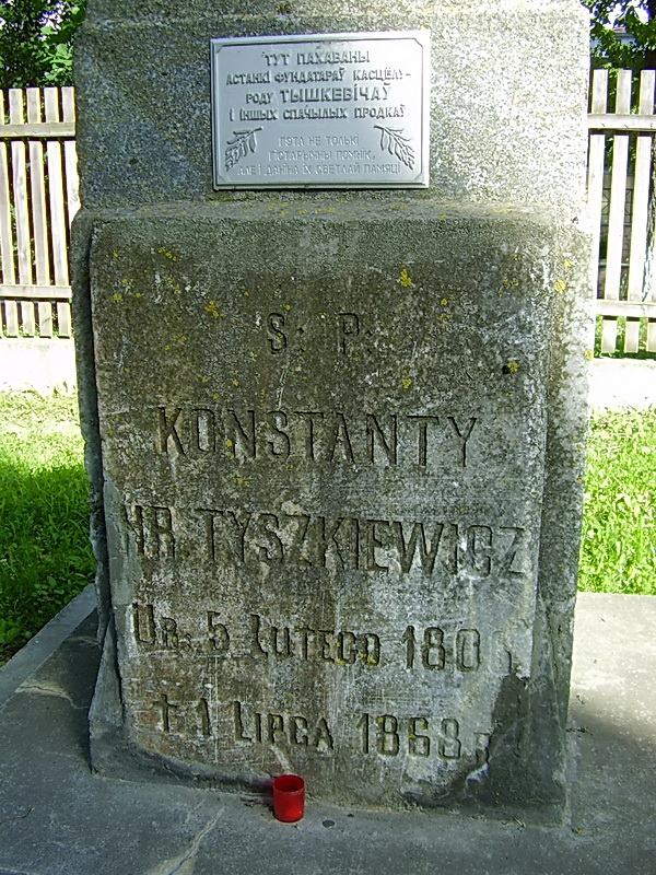 Лагойск. Надмагілле Тышкевічаў: Тут пахаваны астанкі фундатараў касцёлу - роду Тышкевічаў і іншых спачылых продкаў